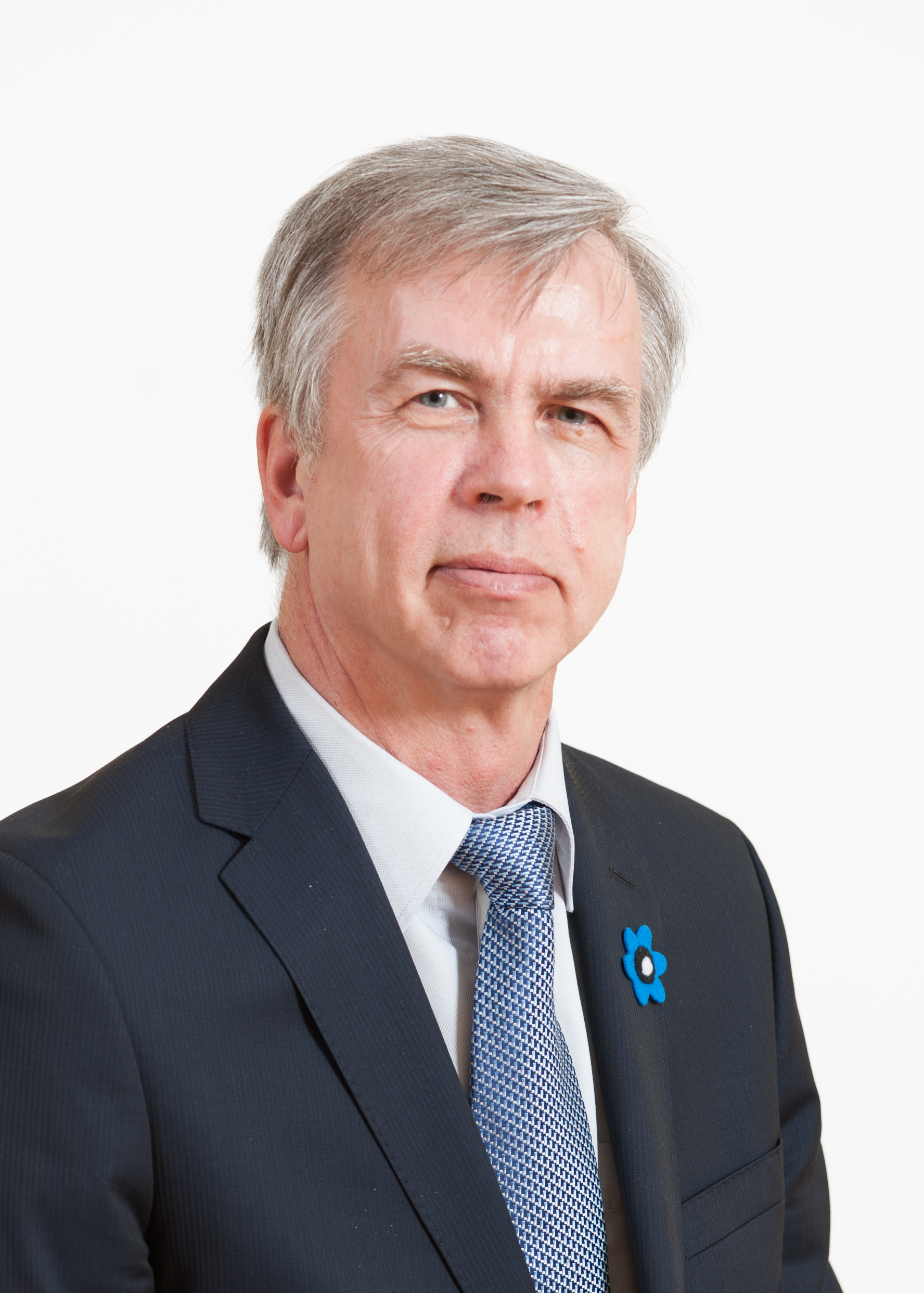 Kalle Muuli